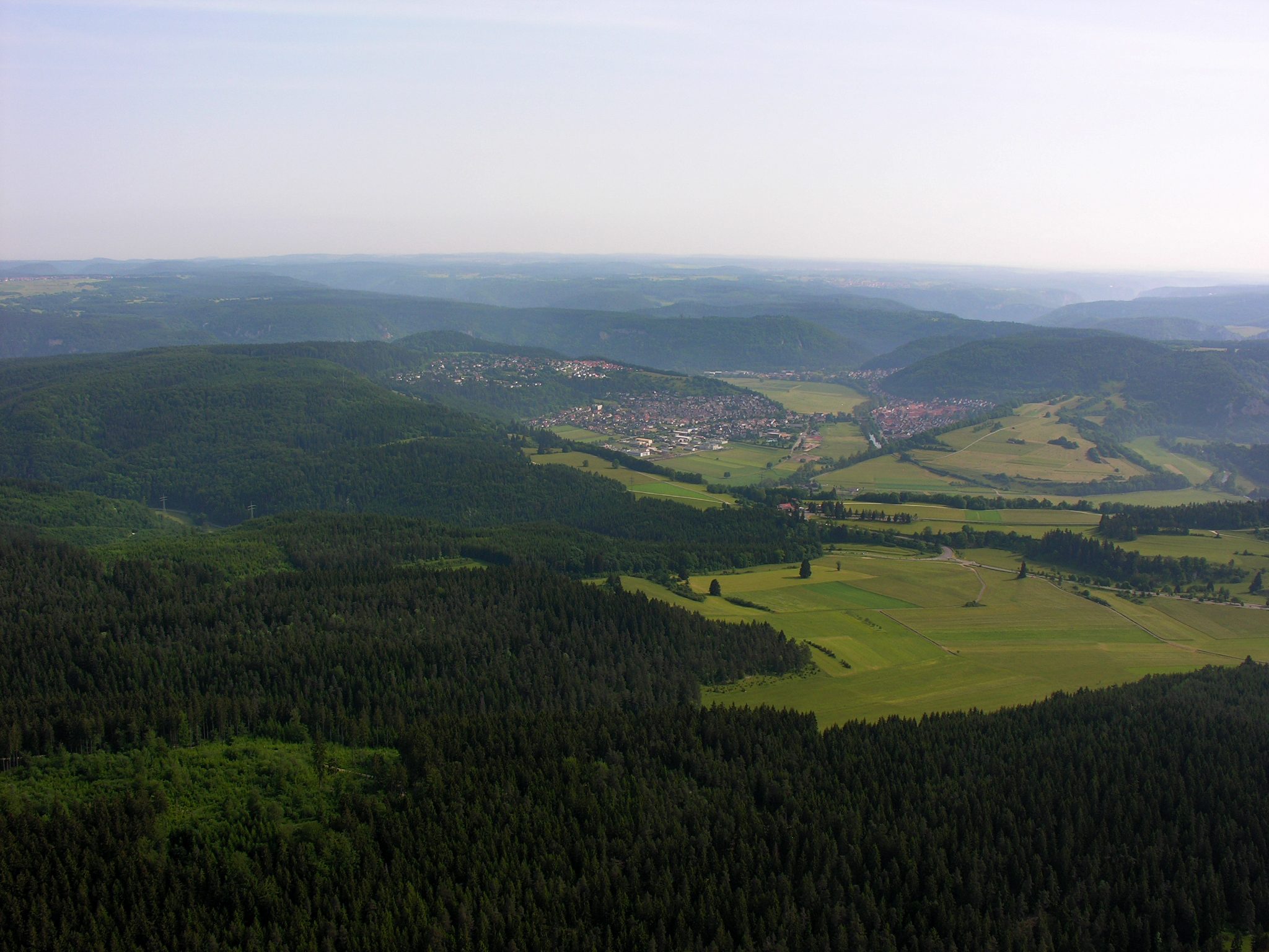 Germany, Baden-Württemberg, Fridingen on the Danube